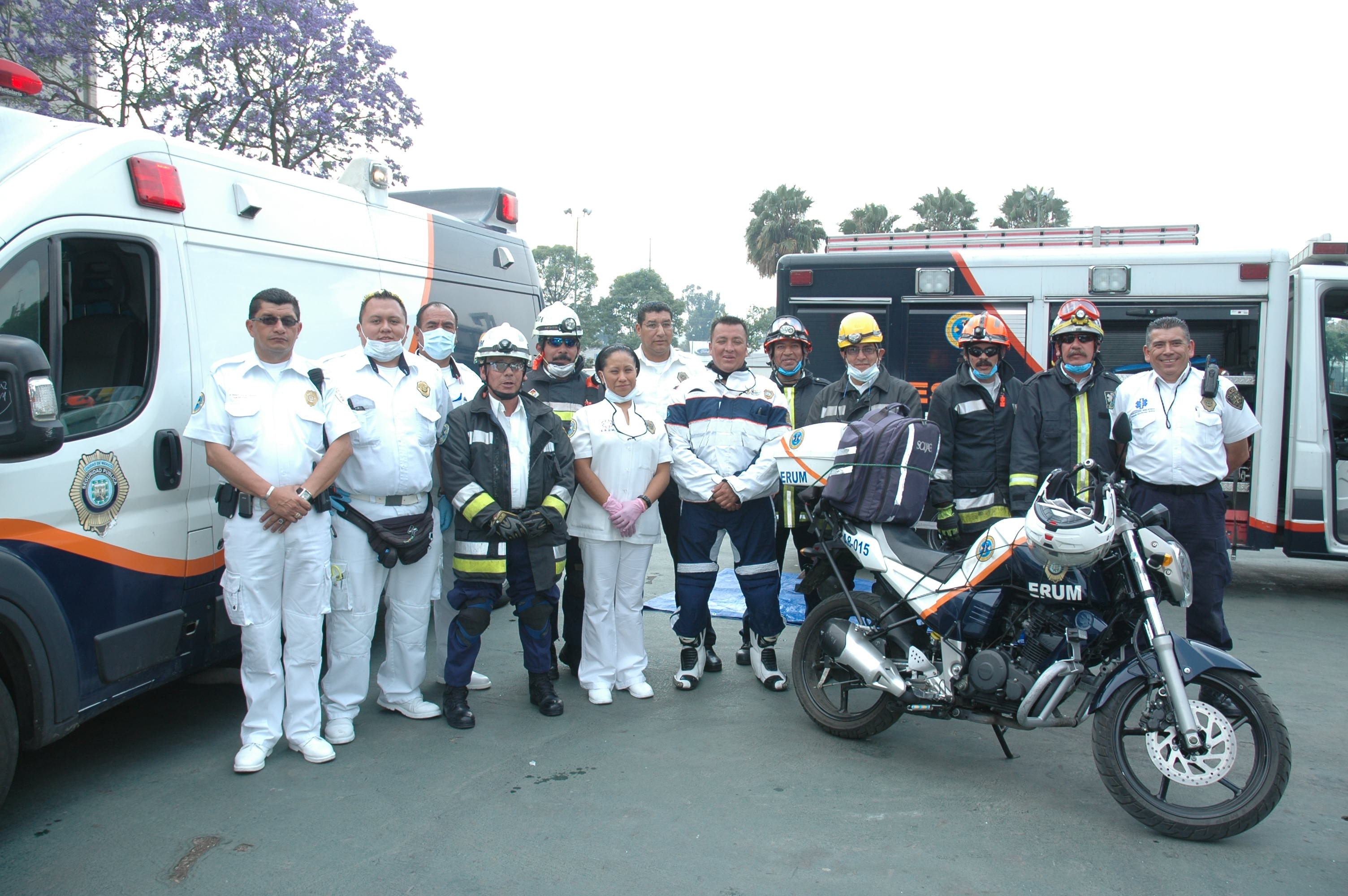 1 Bomberos y paramédicos del Escuadrón de Rescate y Urgencias Médicas en ITESM Campus Ciudad de México